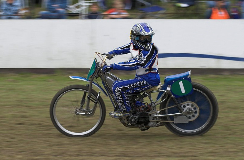 Grasbahnrennen auf dem Leineweberring in Bielefeld, Nordrhein-Westfalen